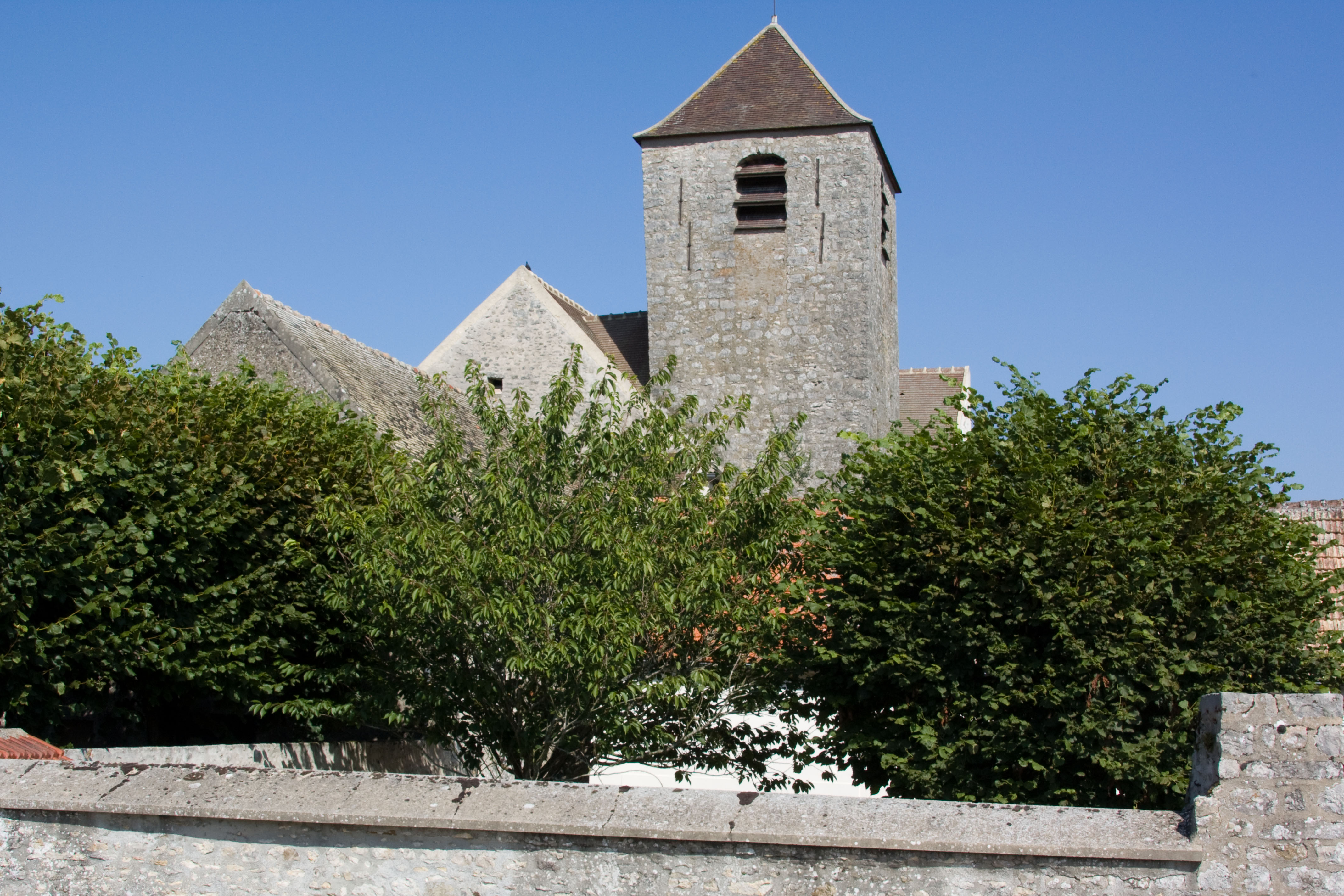 Eglise de Courdimanche-sur-Essonne, Courdimanche-sur-Essonne, Essonne, France